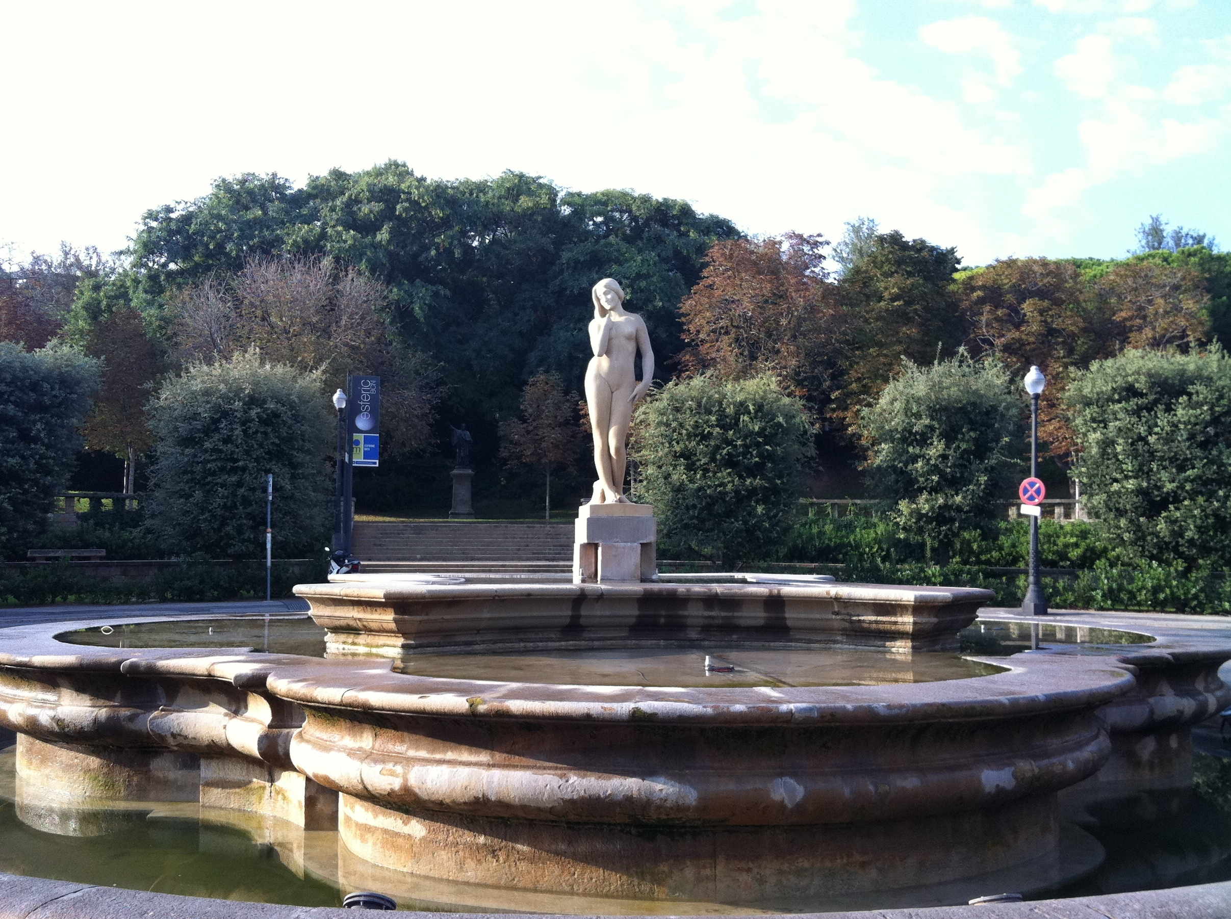 Font la Bellesa (Barcelona) - 080191756